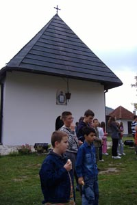 Аутор - Раде Грујичић